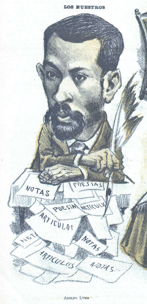 Caricatura.